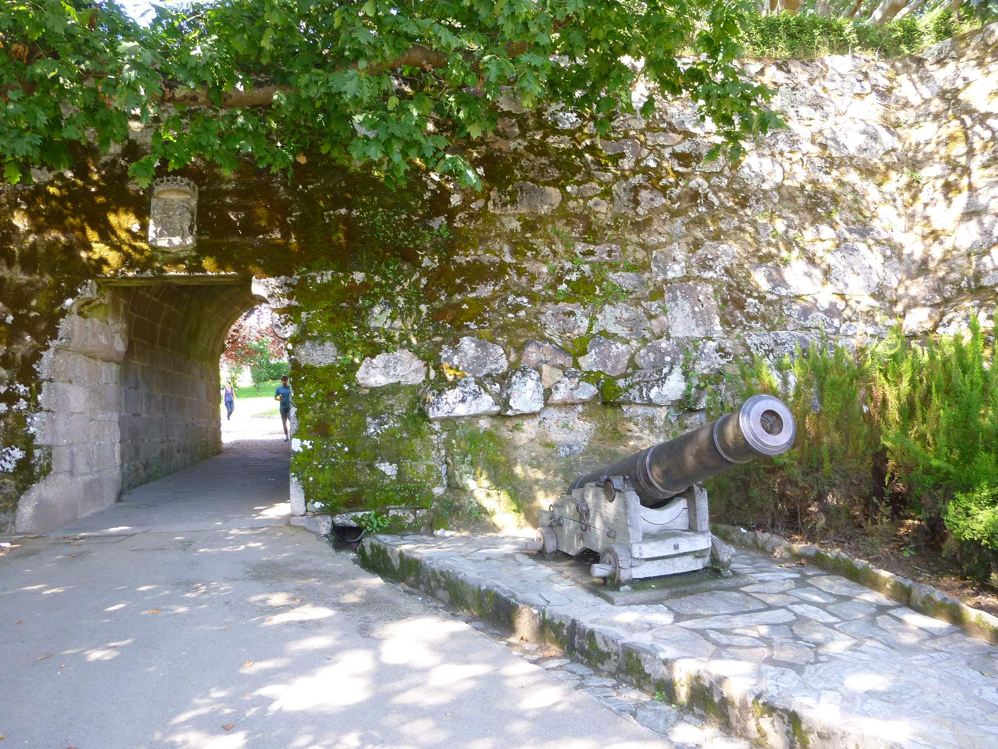 Vigo - Parque do Castro, Fortaleza do Castro